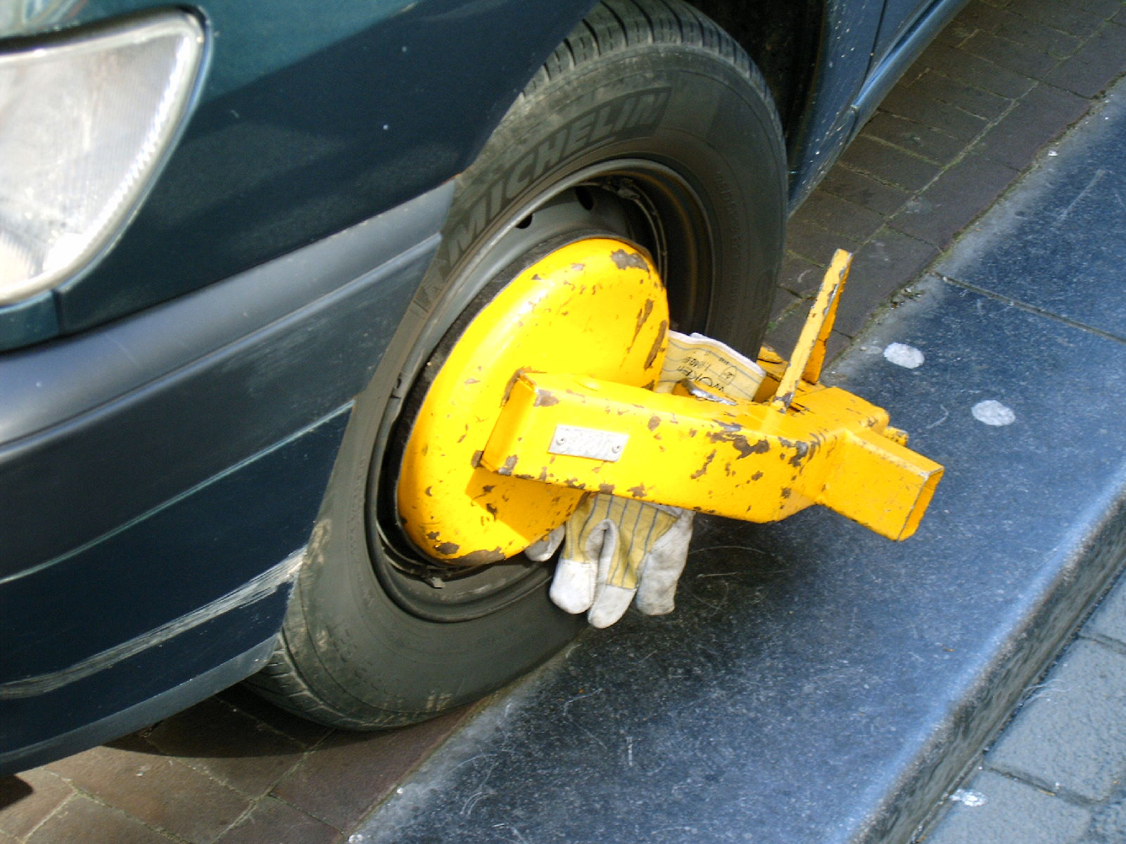 Wielklem in Amsterdam